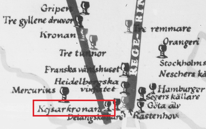 Krogar och värdshus på Negre Norrmalm med "Källaren Kejsarkronan" vid Drottninggatan 6